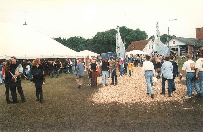 Nibe Festival dengang de afholdte det på Dyreskuepladsen i Nibe